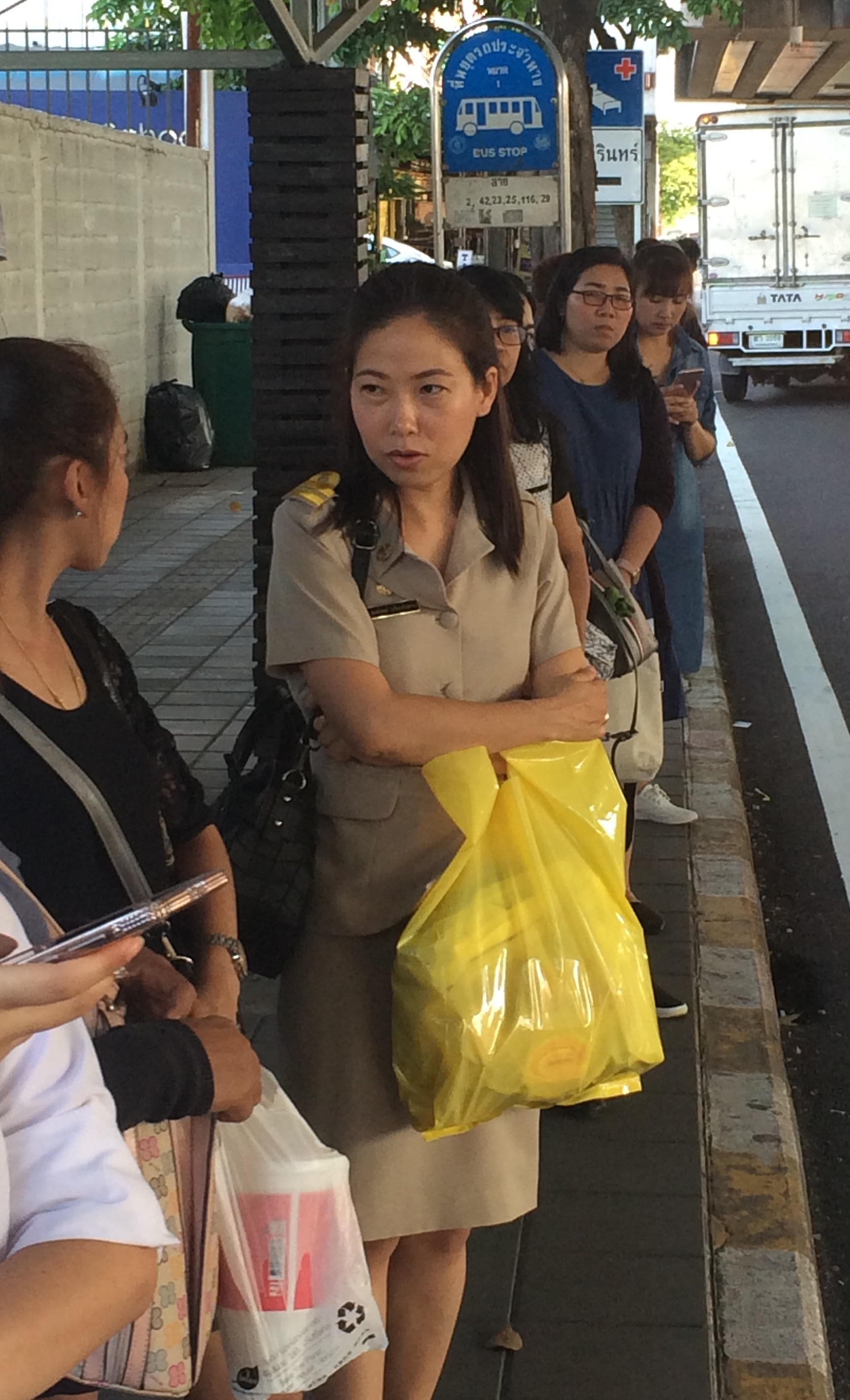 ข้าราชการไทย